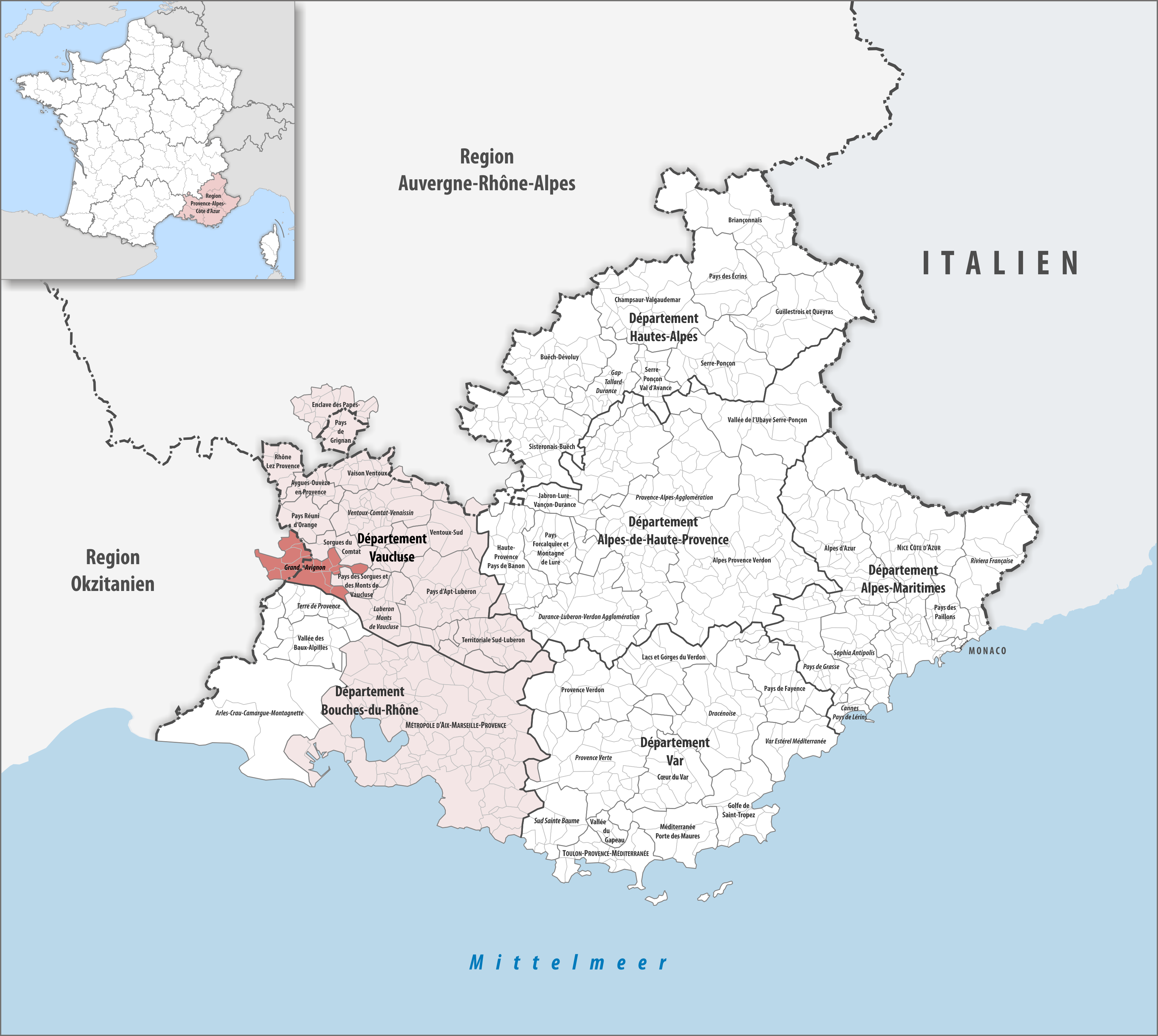 Lage des Gemeindeverbandes Grand Avignon